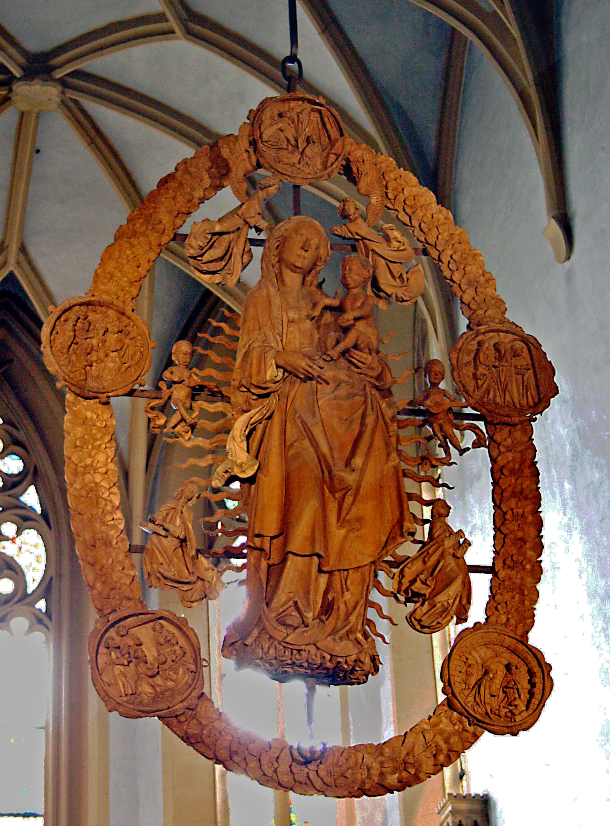 Schwebende Madonna im Rosenkranz von Tilman Riemenschneider 1521–1524 Volkach am Main